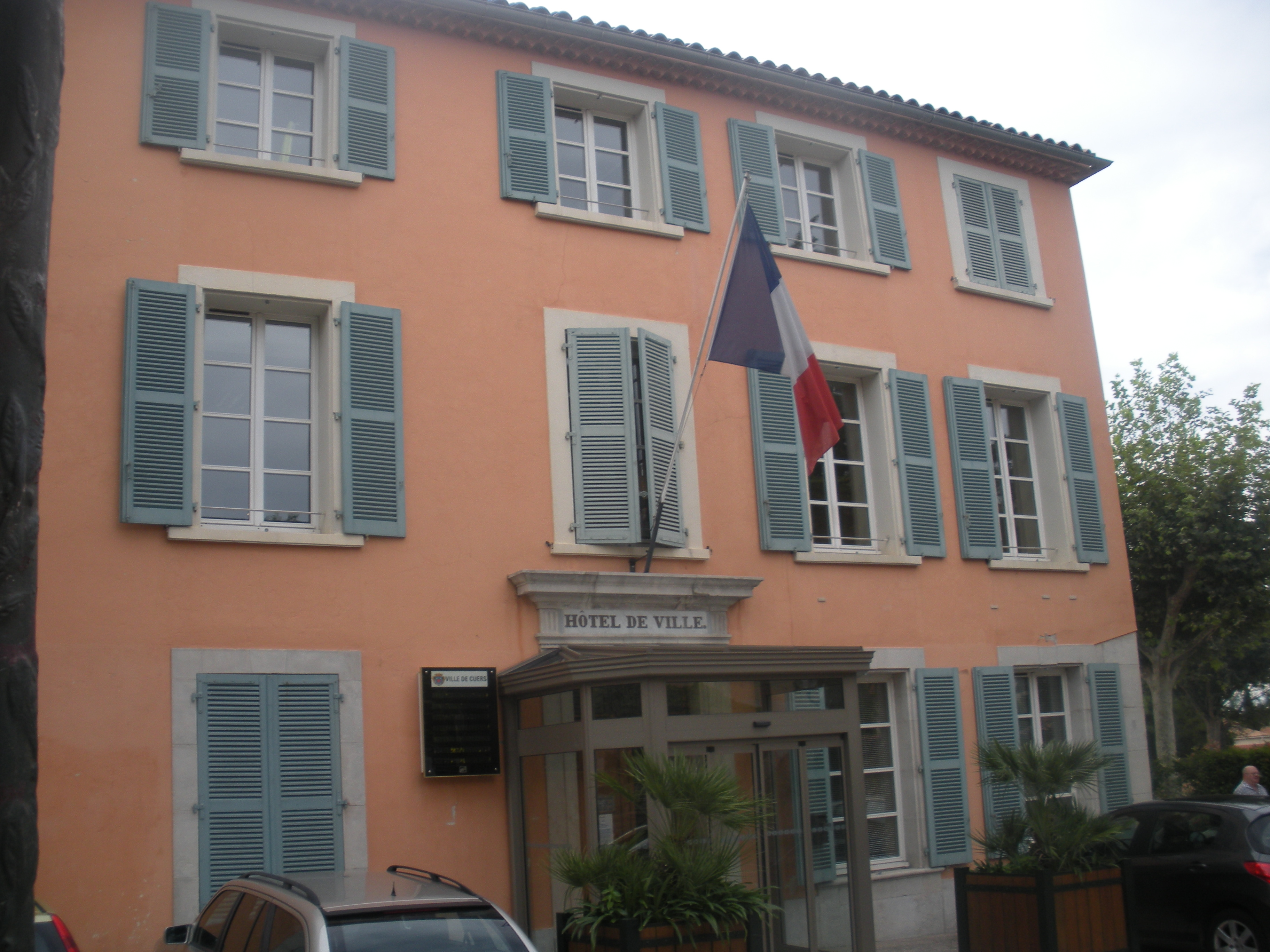 Mairia de Cuers, entrada